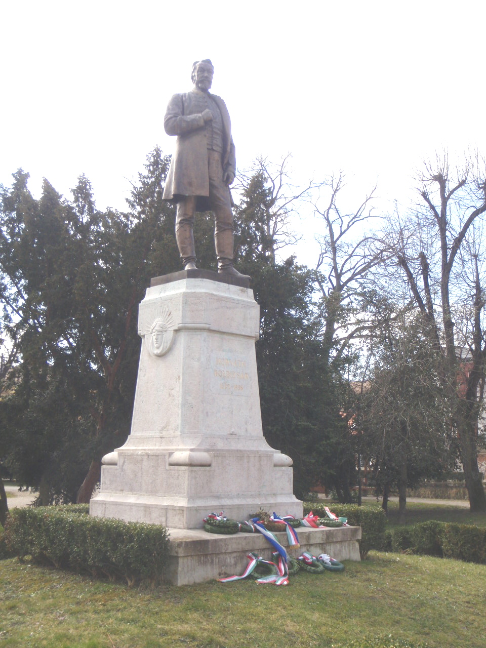 Horvát Boldizsár szobra, Szombathely, Széll Kálmán utca, a Savaria Múzeum kertjében